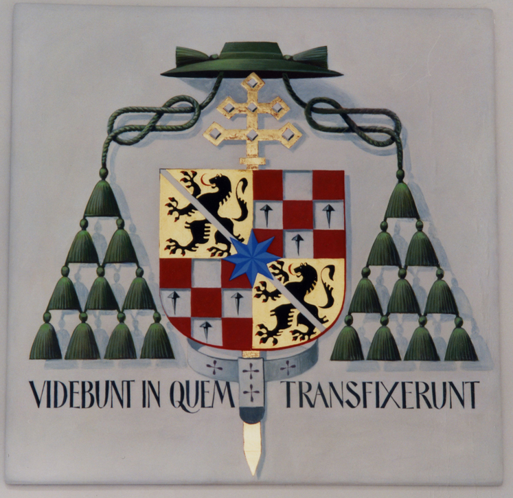 Wappen Erzbischofs Dr. Karl Braun, Erzbischof von Bamberg 1995-2001